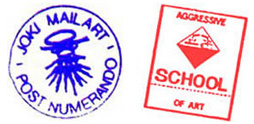 Mailartists' rubber stamps